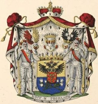 Lieveni suguvõsa vürstivapp